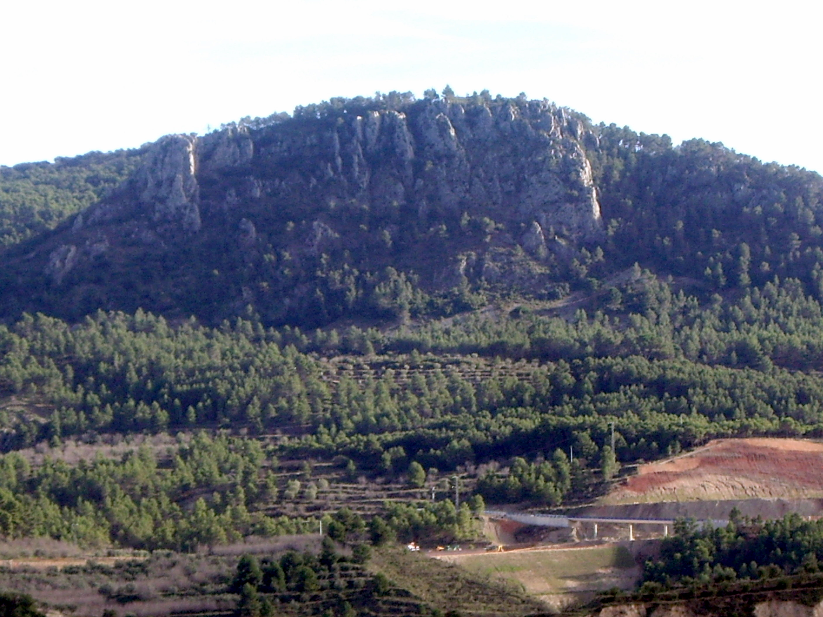 Ull del Moro. Alcoi